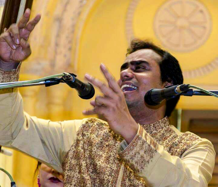 Pt. Shyam Sundar Goswami performing at Sovabajar Rajbari in 2014